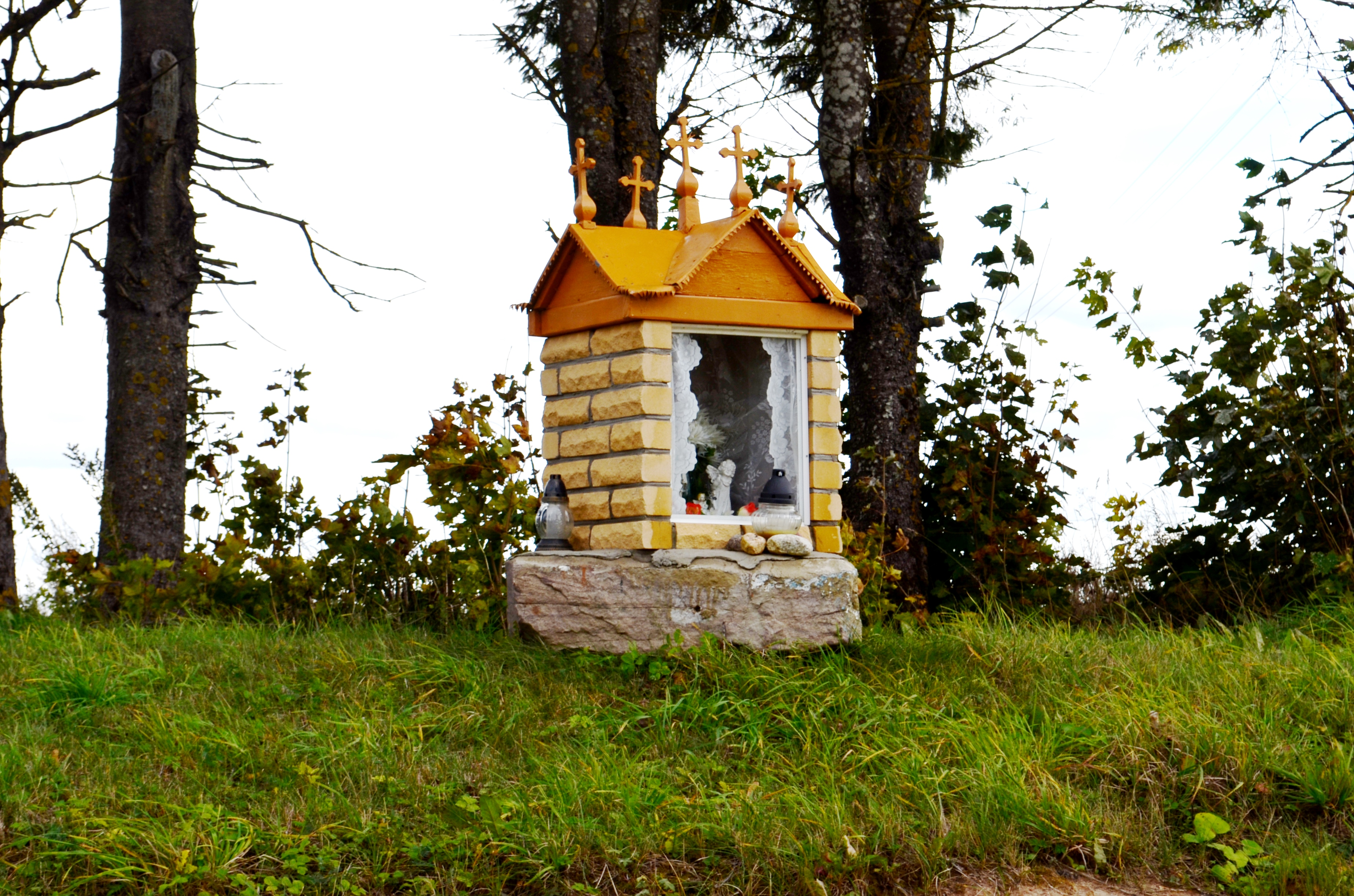 Koplytėlė, Lopaičiai, Rietavo sav.